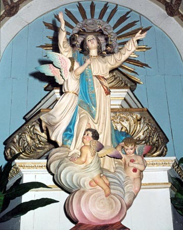 Nossa Senhora da Assunção na Igreja Matriz de Proença-a-Nova